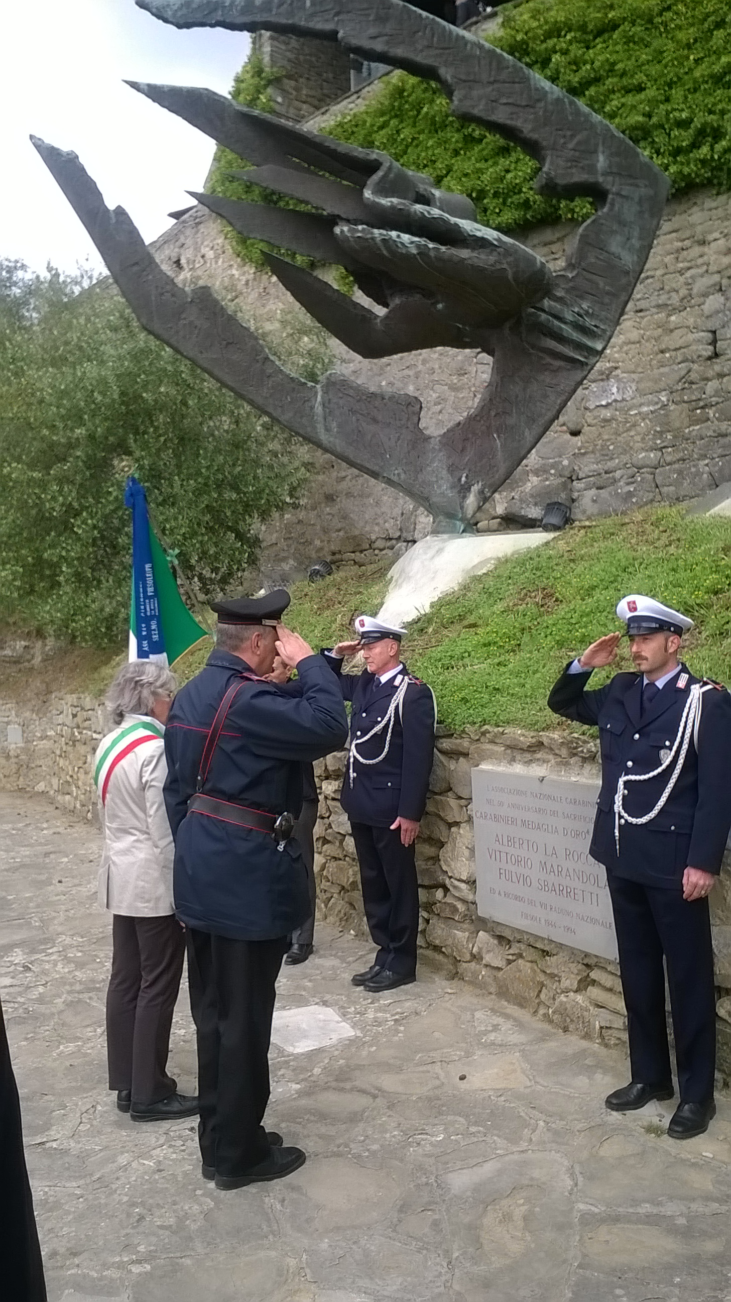 Raduno Associazione Nazionale Carabinieri, Parco della Rimembranza, 17 settembre 2017